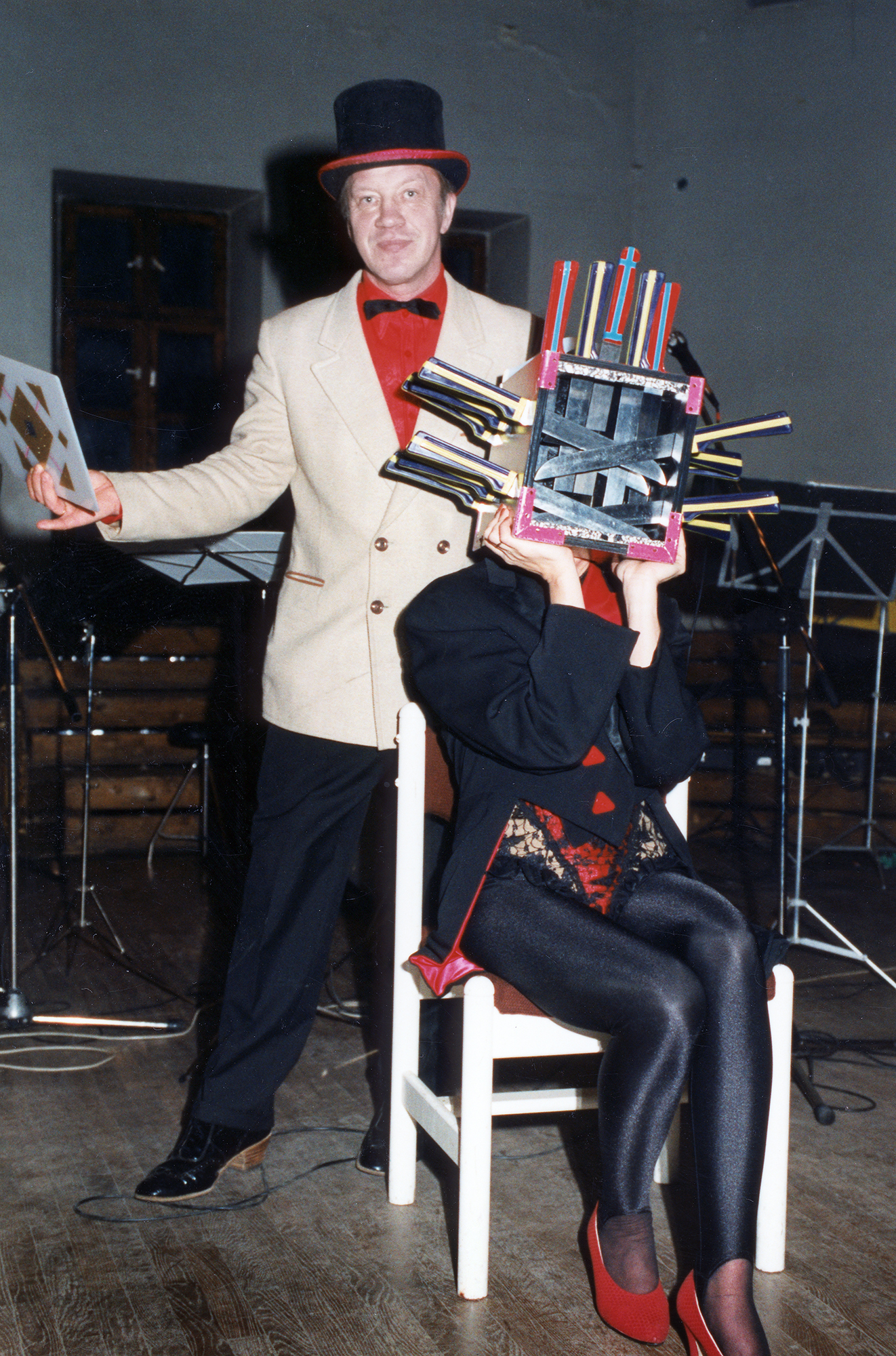 Tõnu Ojavee, illusionist 2001